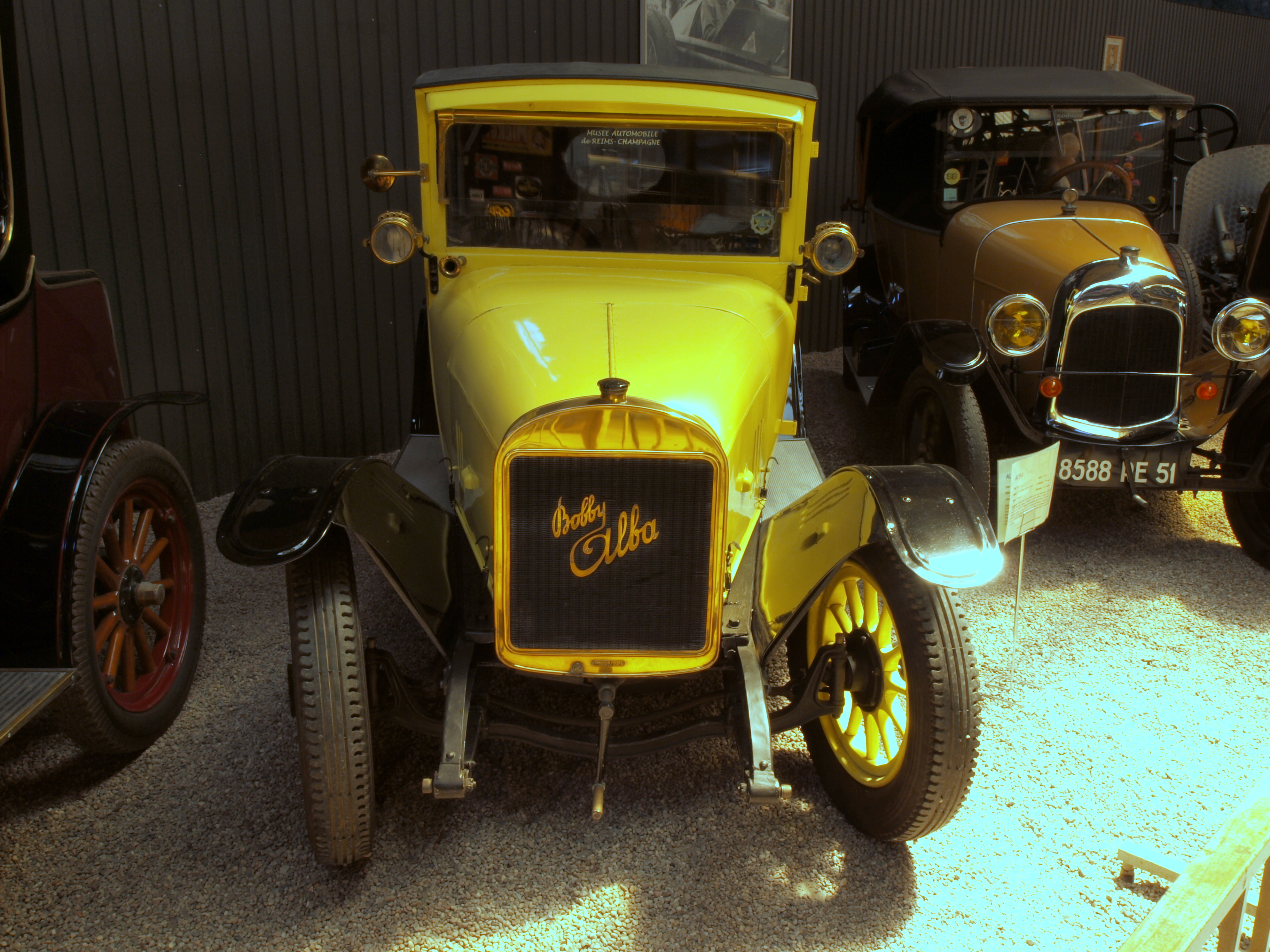 1919 Alba R